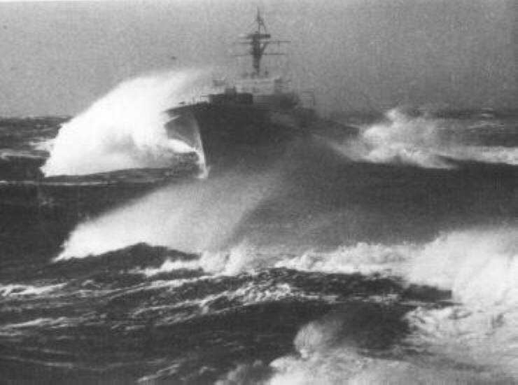 Deutsches Torpedo-Schnellboot der Jaguar-Klasse (140) in schwerer See um 1960. Die Schnellboote der deutschen Bundesmarine liefen auch bei widrigen Wetterbedingungen aus.